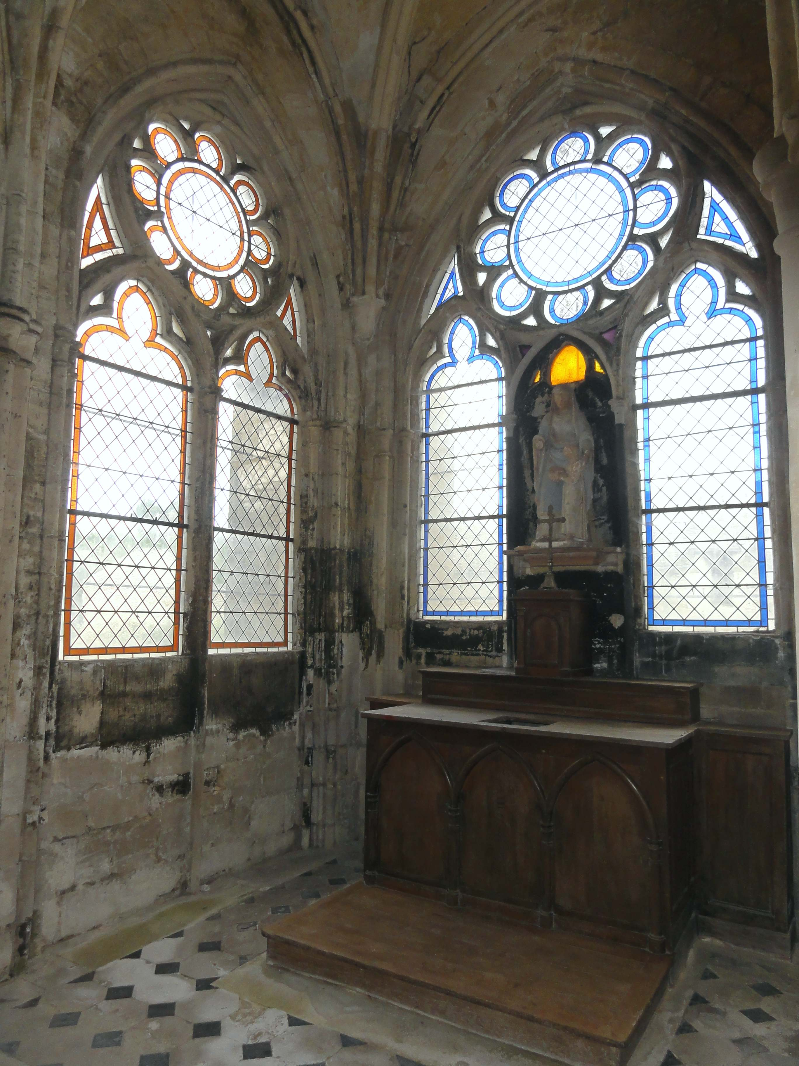 Intérieur de l'église - voir le titre du fichier.